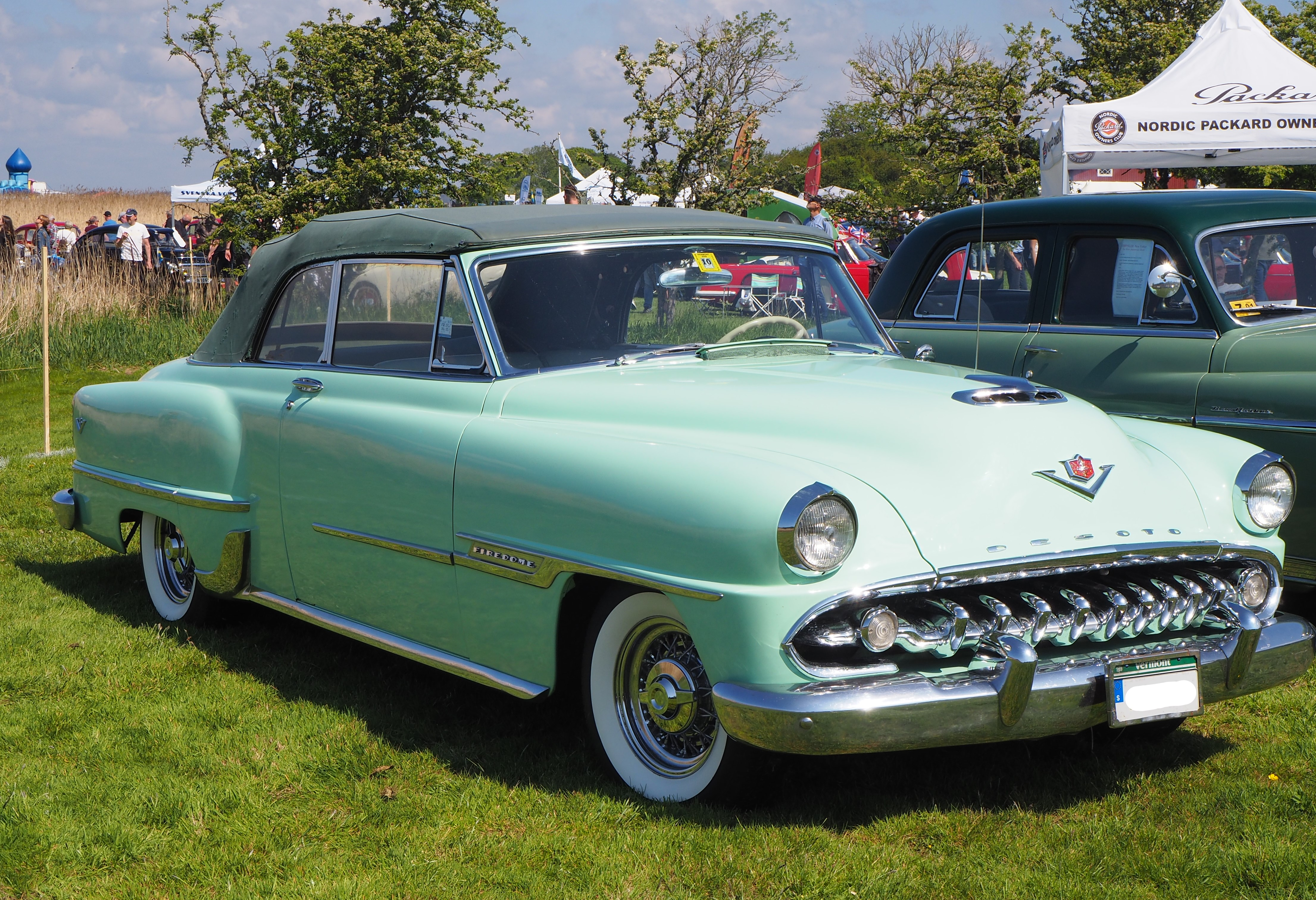 1954 De Soto Firedome